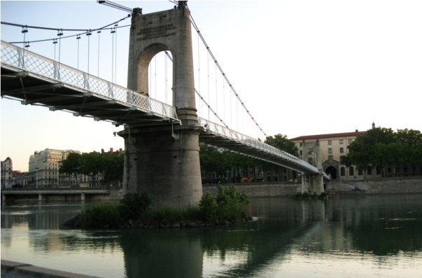 Lycée Ampère et passerelle du Collège vus des berges du Rhône.